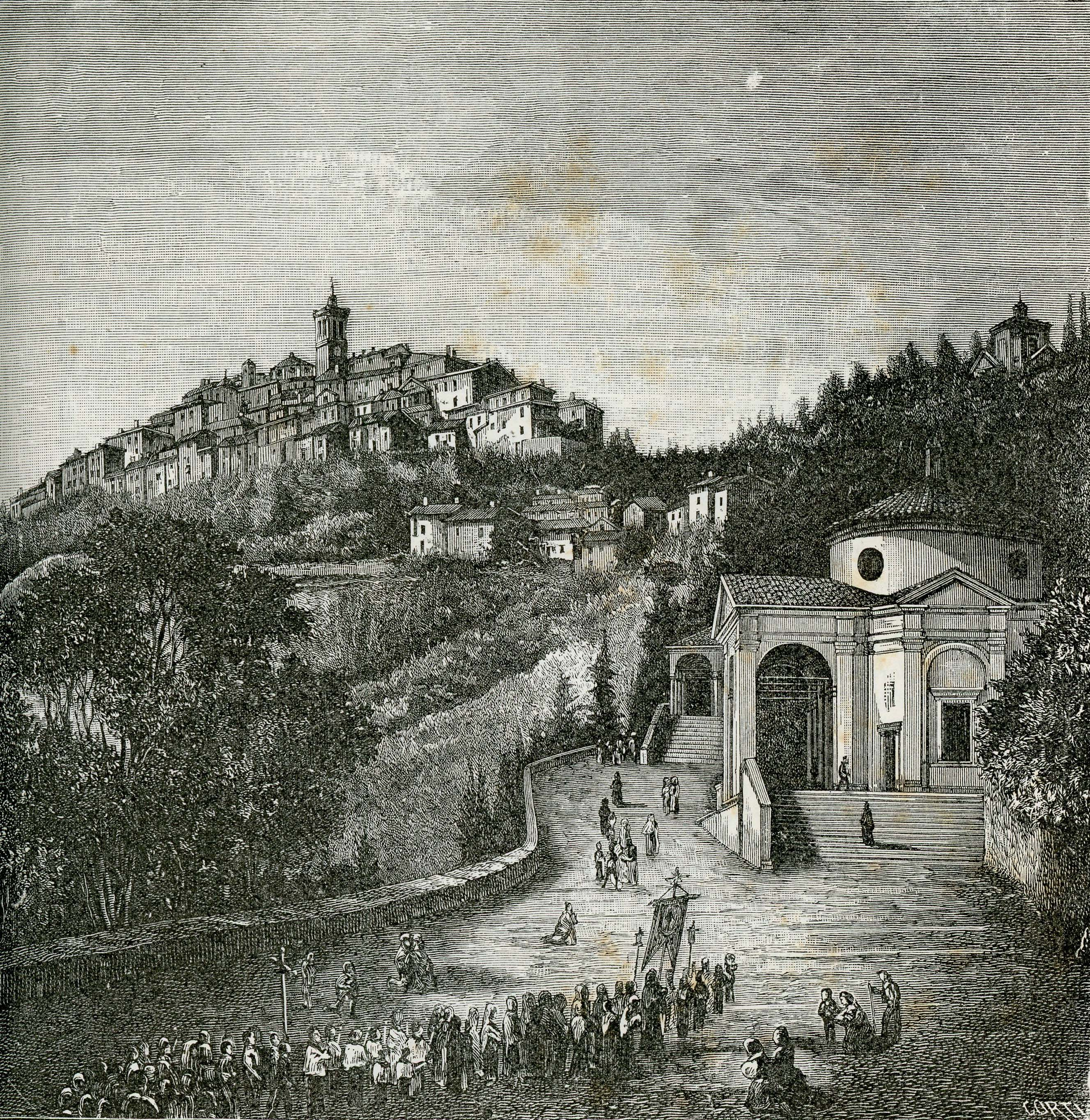 Varese: Santuario del Sacro Monte (xilografia di Corti).